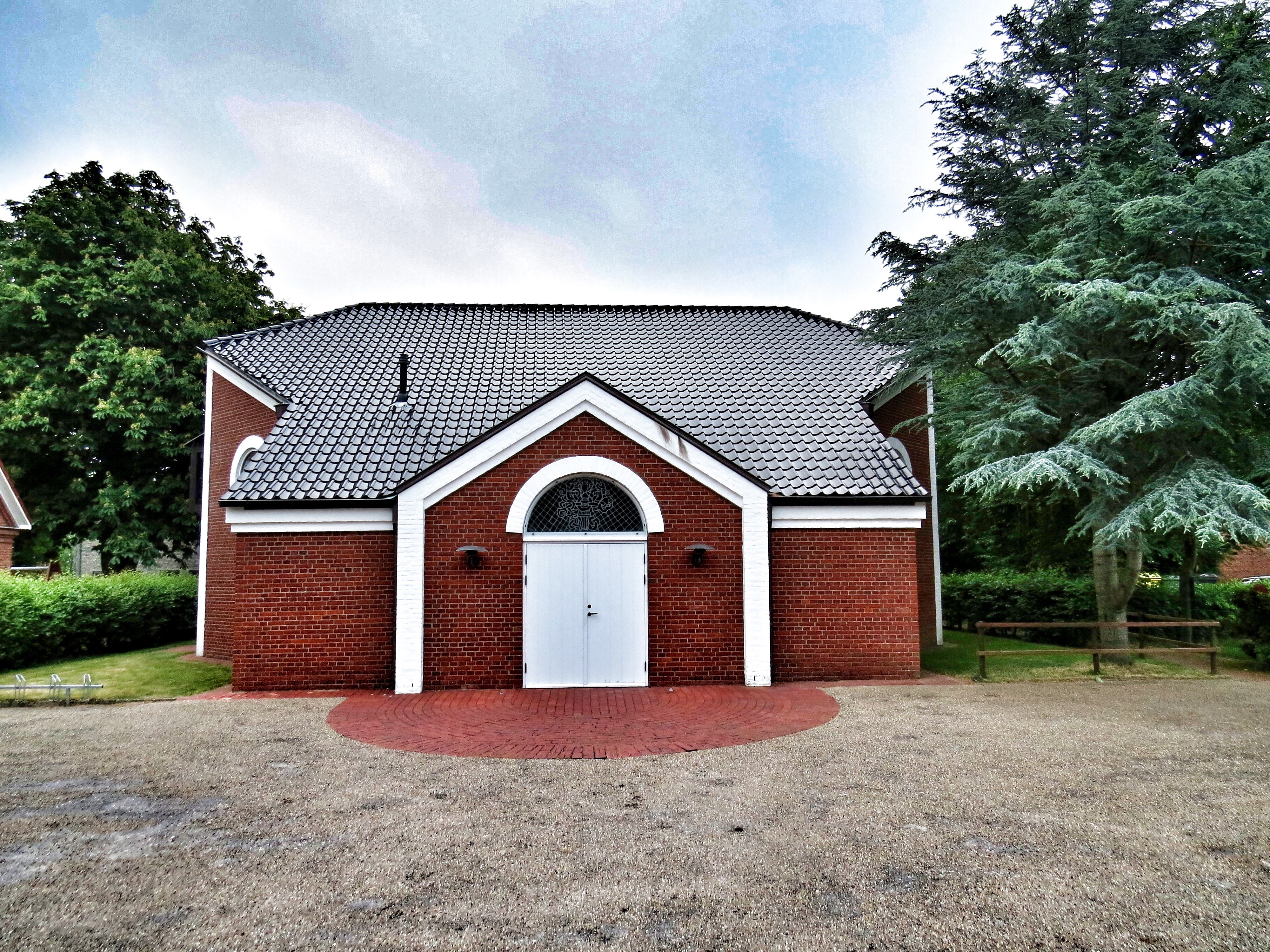 Danske kirke i Husum